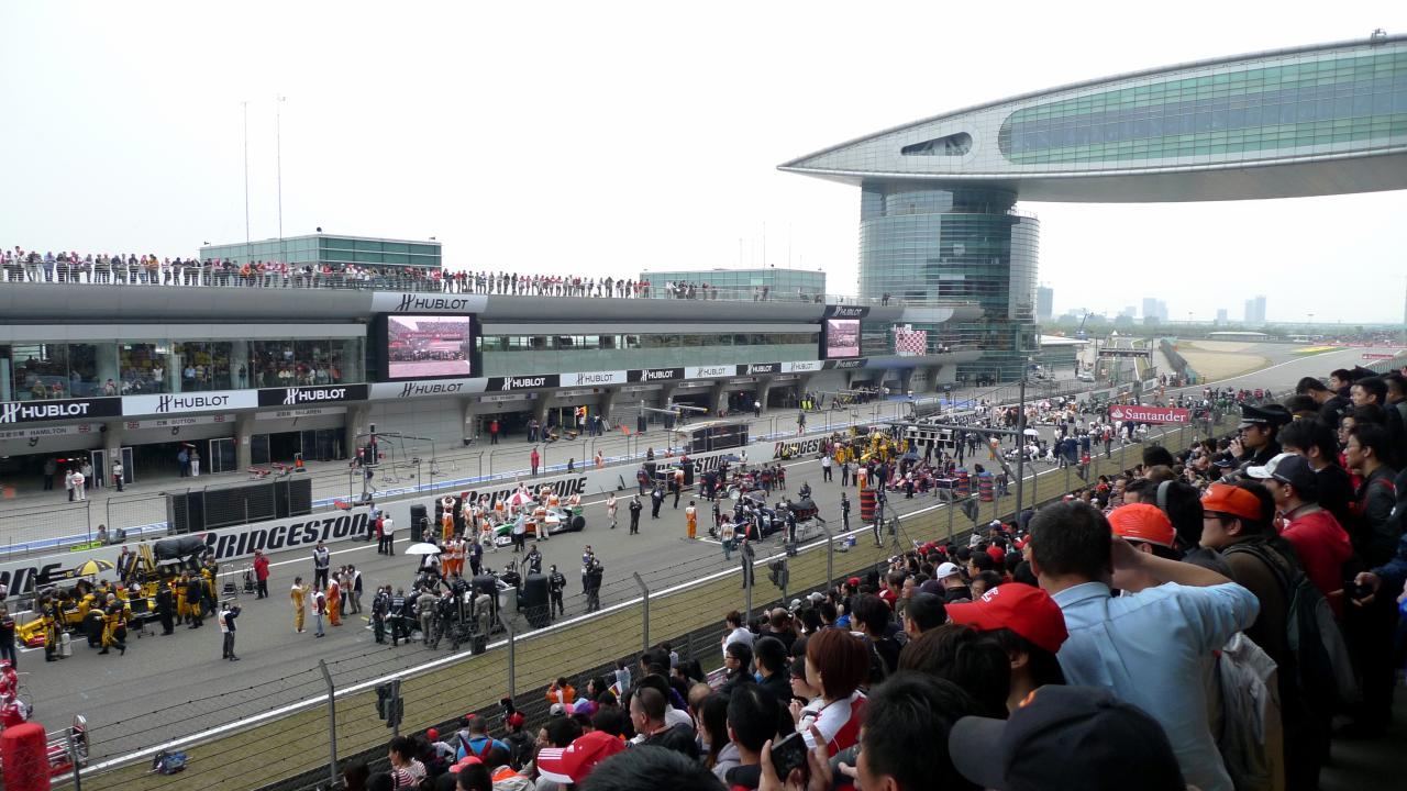 Starting Grid F1 Shanghai